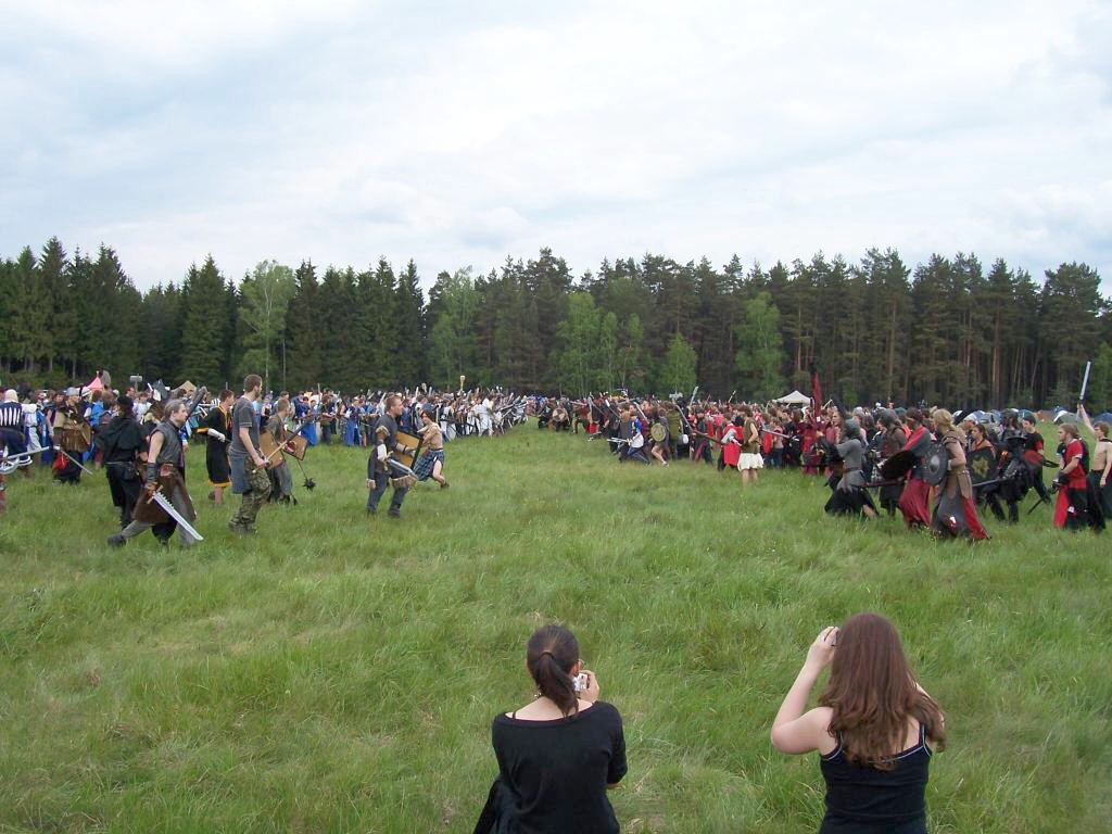 Dřevárna